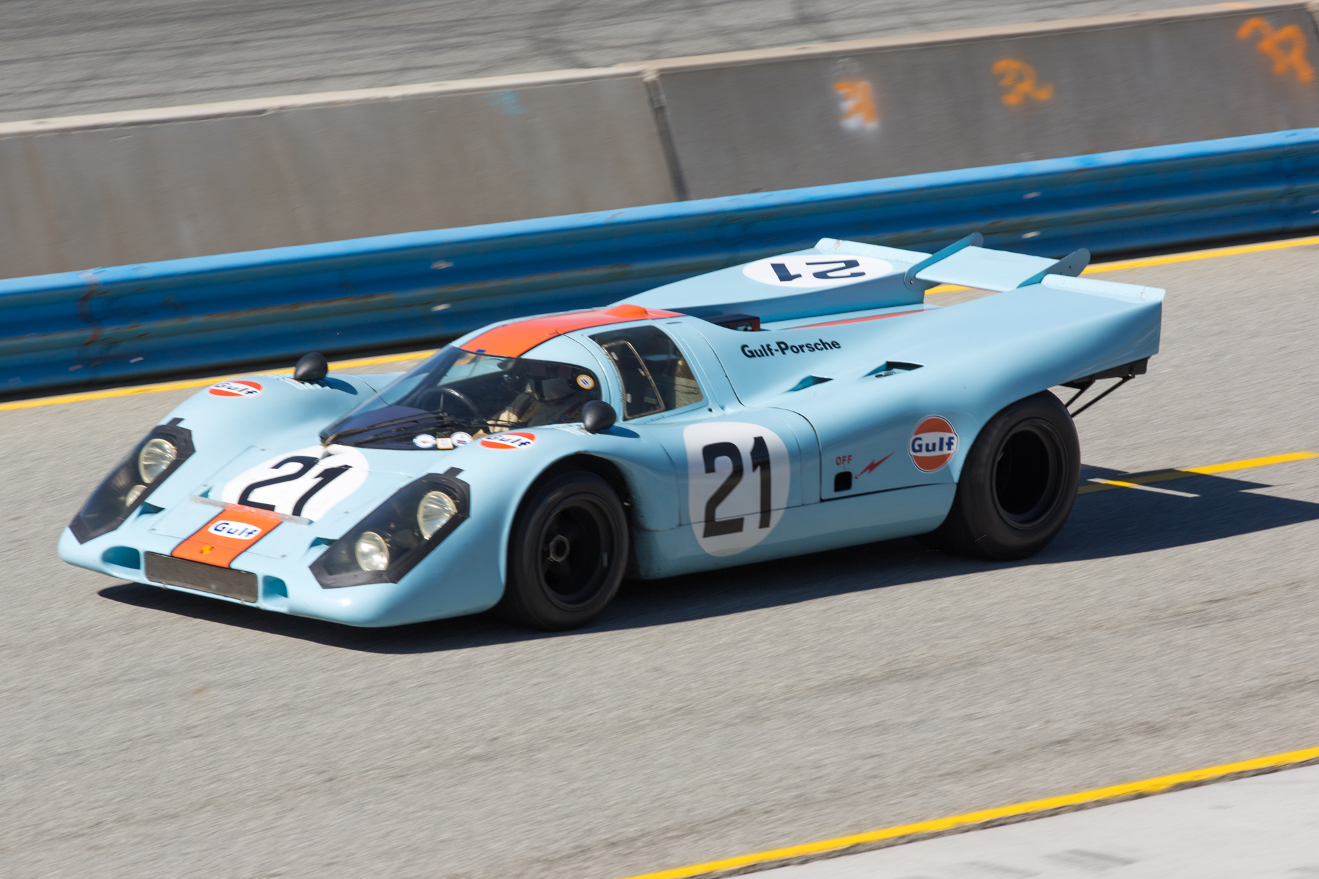 Rennsport Reunion V